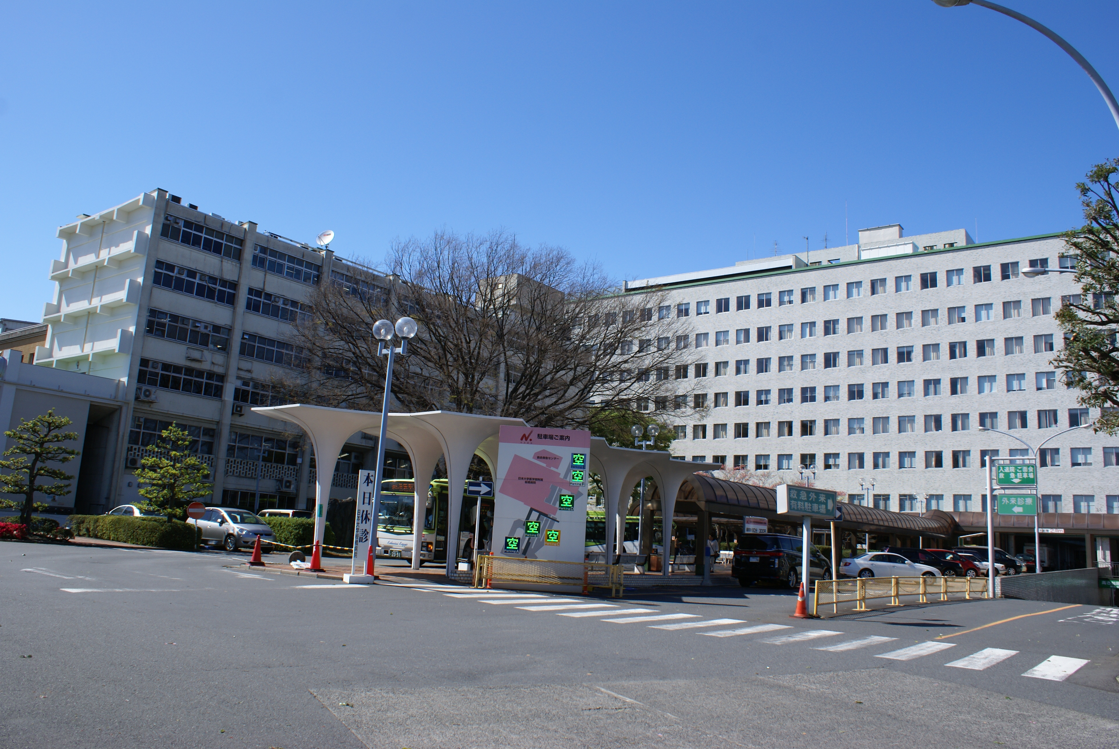 日大板橋病院